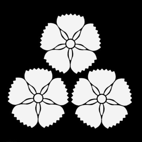 三つ撫子